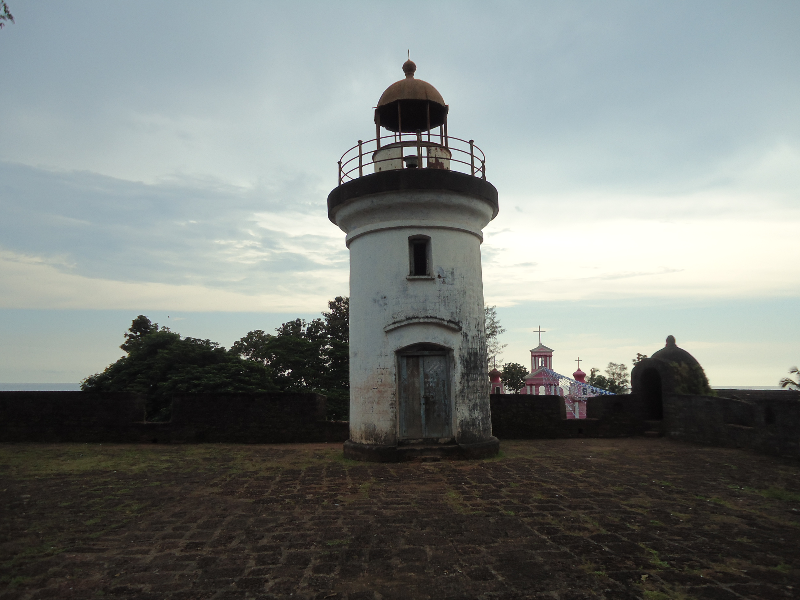 തലശ്ശേരി കോട്ടയിലെ വിളക്കുമാടം